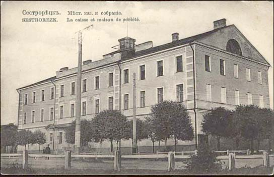 Сохранившееся здание на пл.Свооды д.3 в Сетрорецке СПб